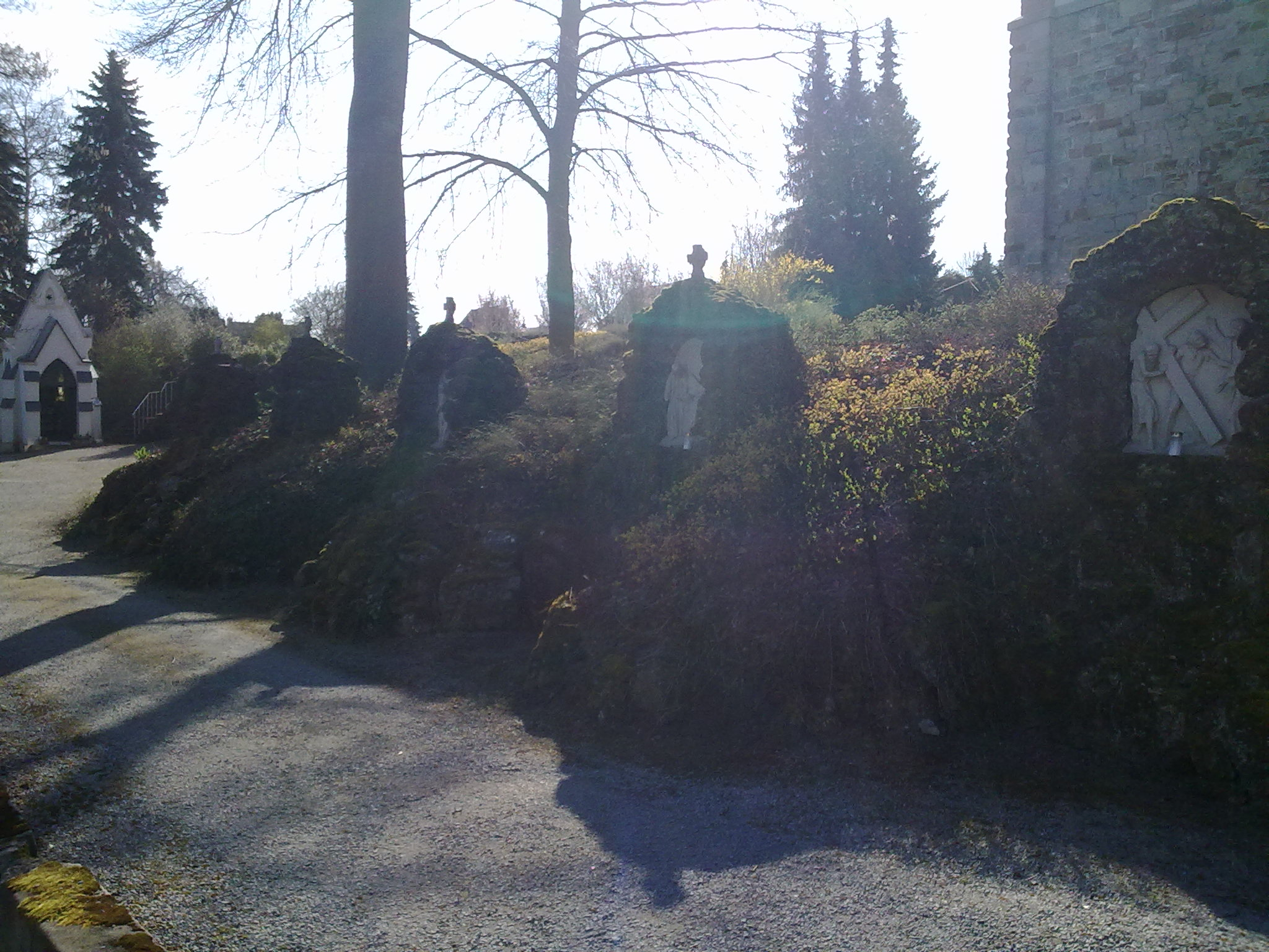 Das Foto zeigt den Kreuzweg des Klosters Maria Hilf in Dernbach im Westerwald.